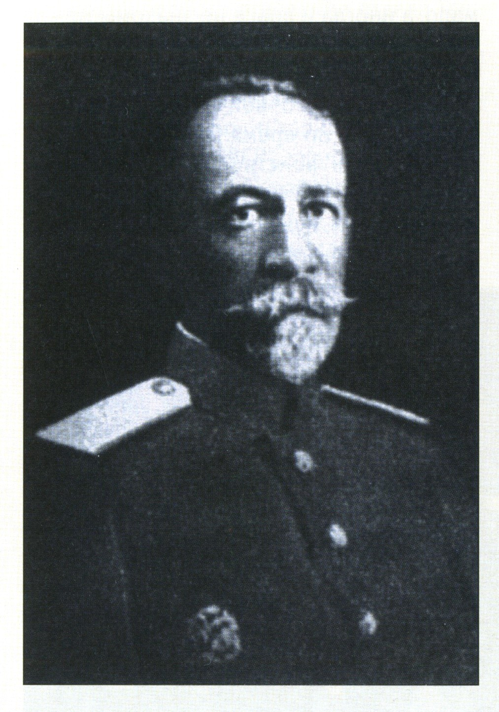 El general blanco Borís Kazanóvich